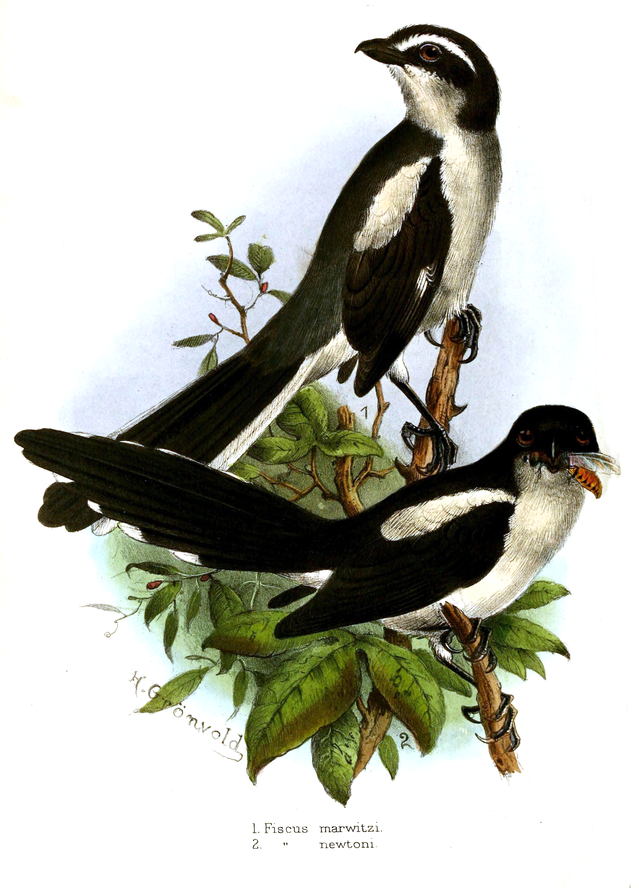 Fiscus marwitzi =Lanius marwitzi, Fiscus newtoni = Lanius newtoni